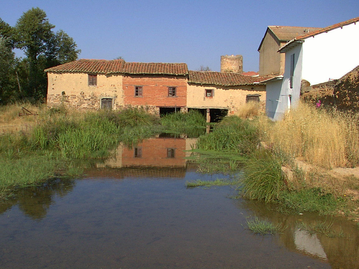 Molino hidrúalico de Palacios de la Valduerna.